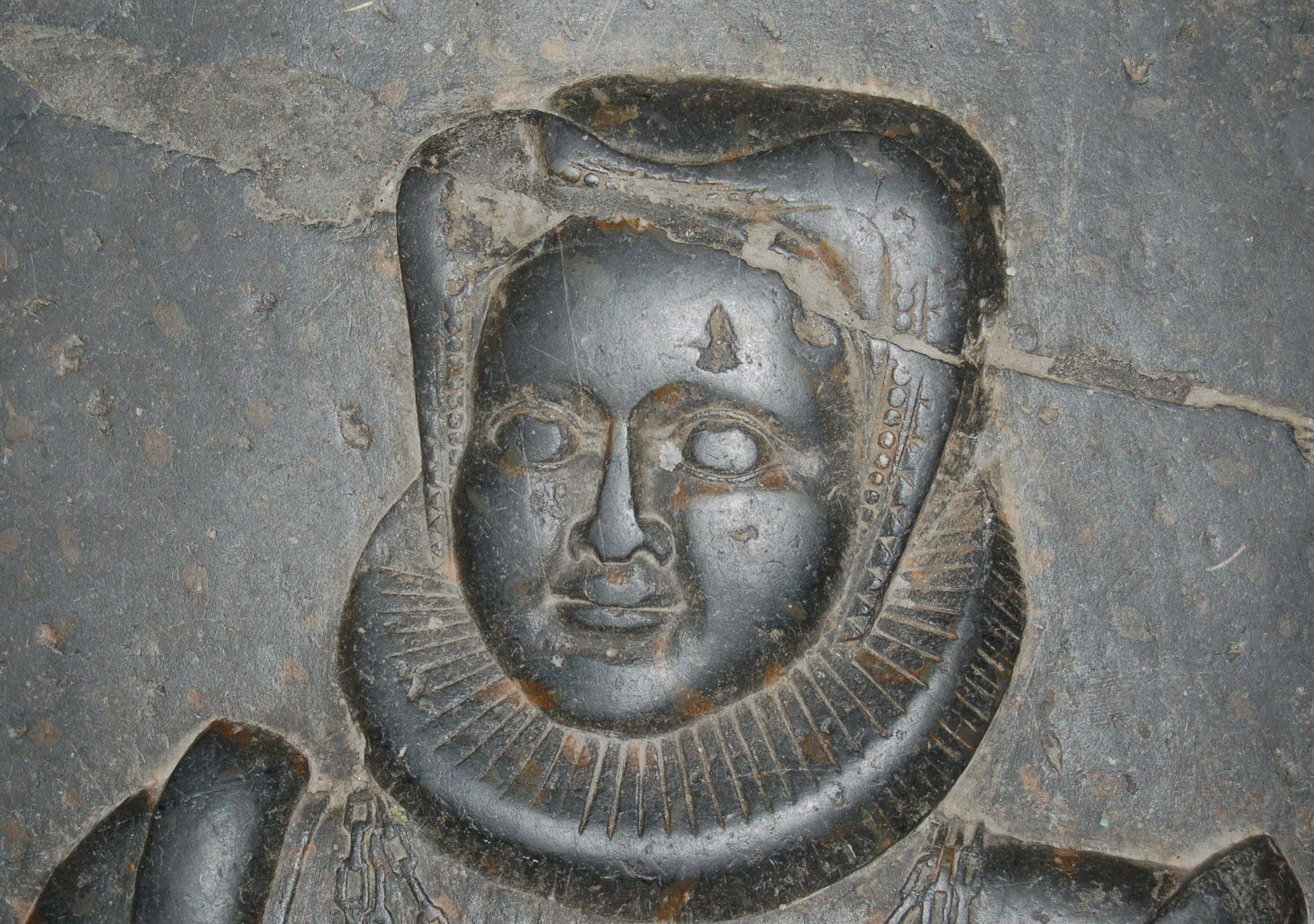 Margrethe Breide - gravstein i Hedrum kirke